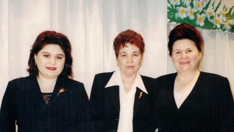 Г.Ҡолһарина, С. Әлмәтова, Г. Ситдиҡова Сермән балалар йортонда